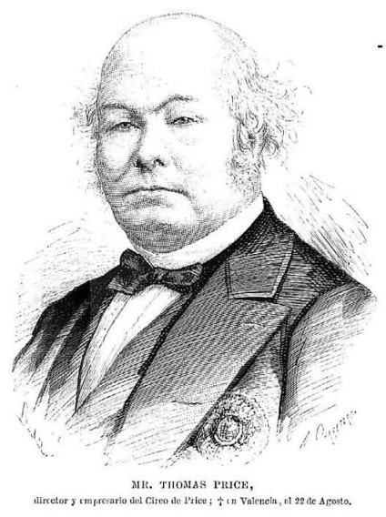 Mr. Thomas Price, director y empresario del Circo de Price, muerto en Valencia el 22 de agosto.